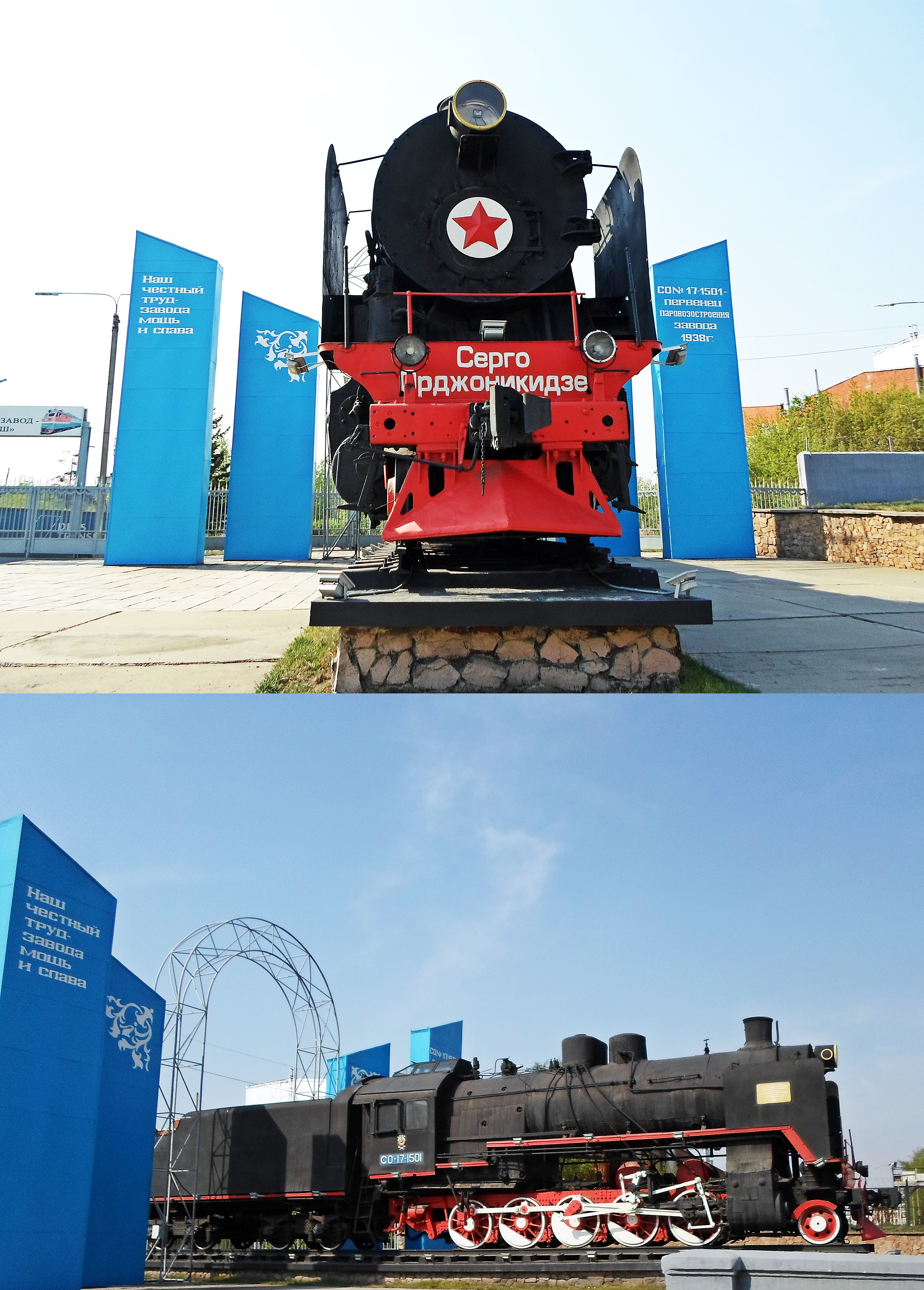 Паровоз "Серго Орджоникидзе" у проходной ЛВРЗ. Улан-Удэ.